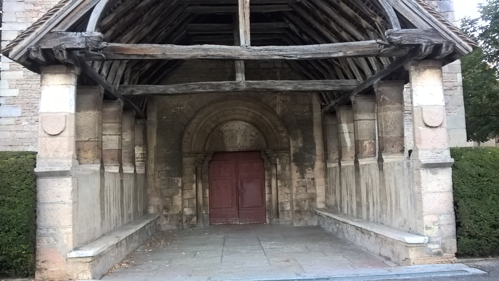 Preĝejo Sankta Nikolao Beaune la antaŭ pordo